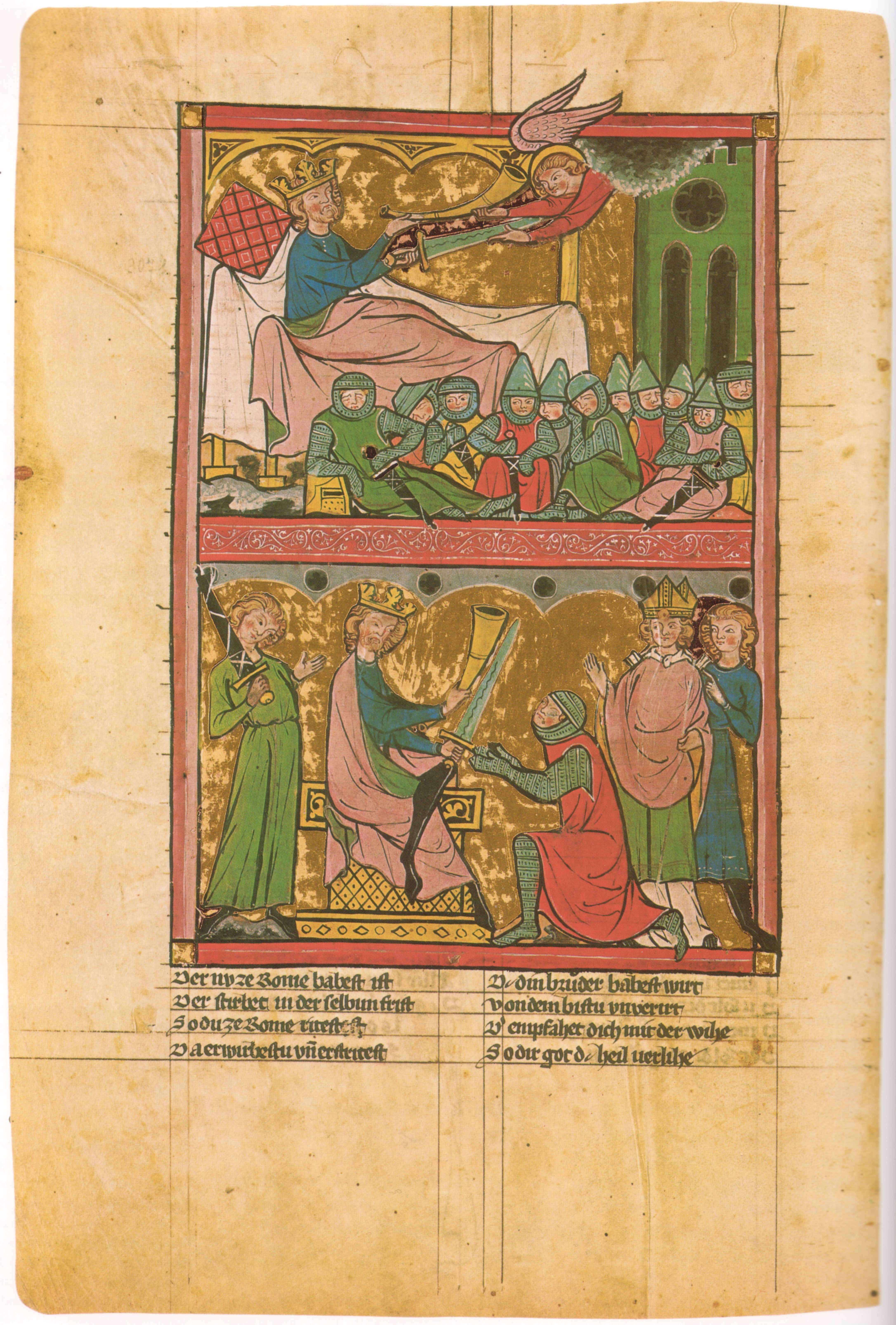 Rudolf von Ems, Karl (3v); Berlin, Staatsbibliothek, Mgf. 623